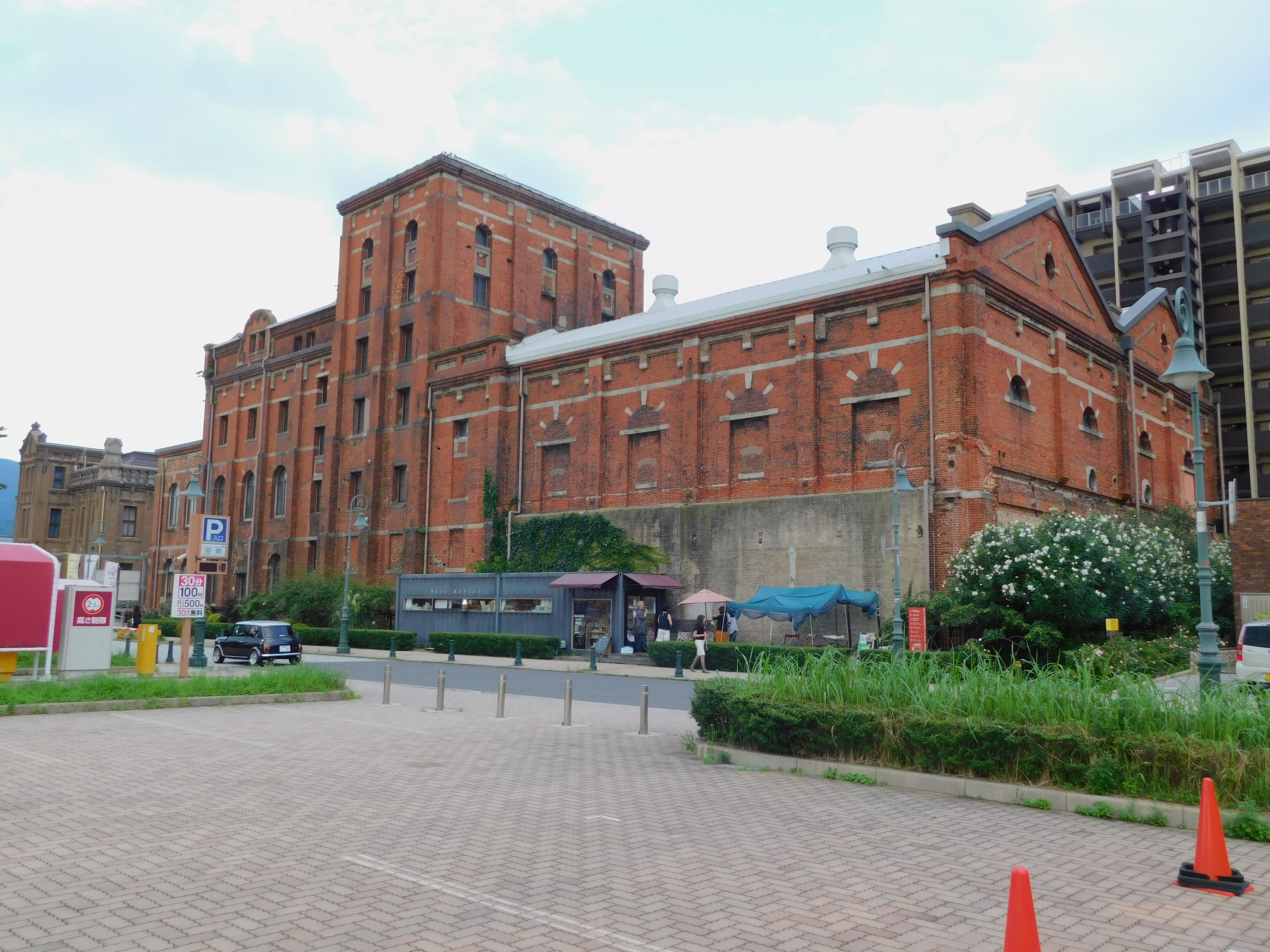 帝国麦酒 (現・門司赤煉瓦プレイス) 旧・鈴木商店 2019年7月27日撮影